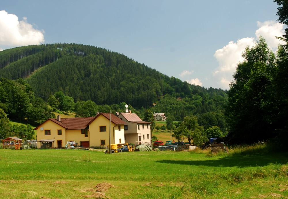 Košařiska - Milíř